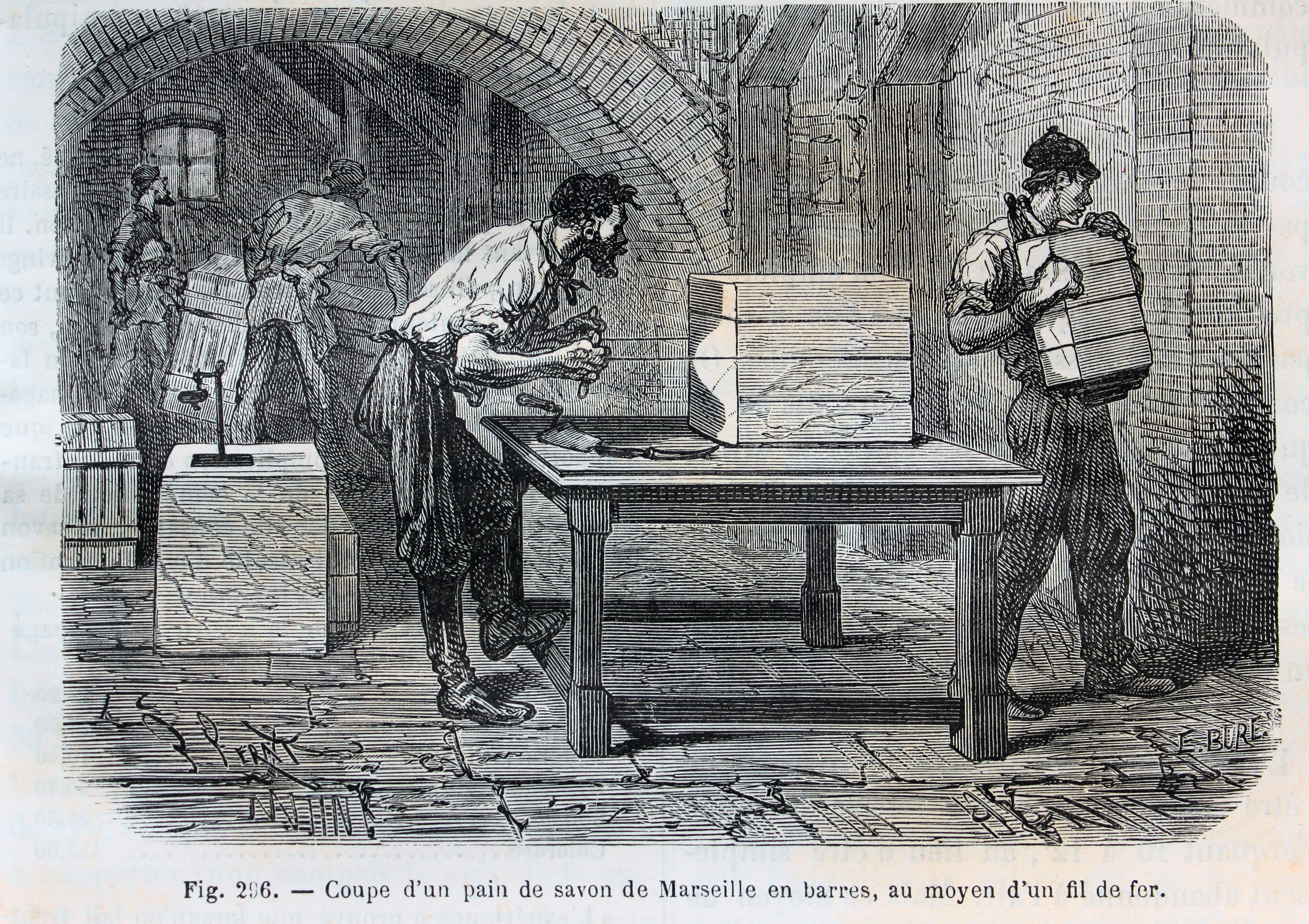 Ilustraciones de la obra : Les merveilles de l'industrie ou, Description des principales industries modernes / par Louis Figuier. - Paris : Furne, Jouvet, [1873-1877]. - Tome I